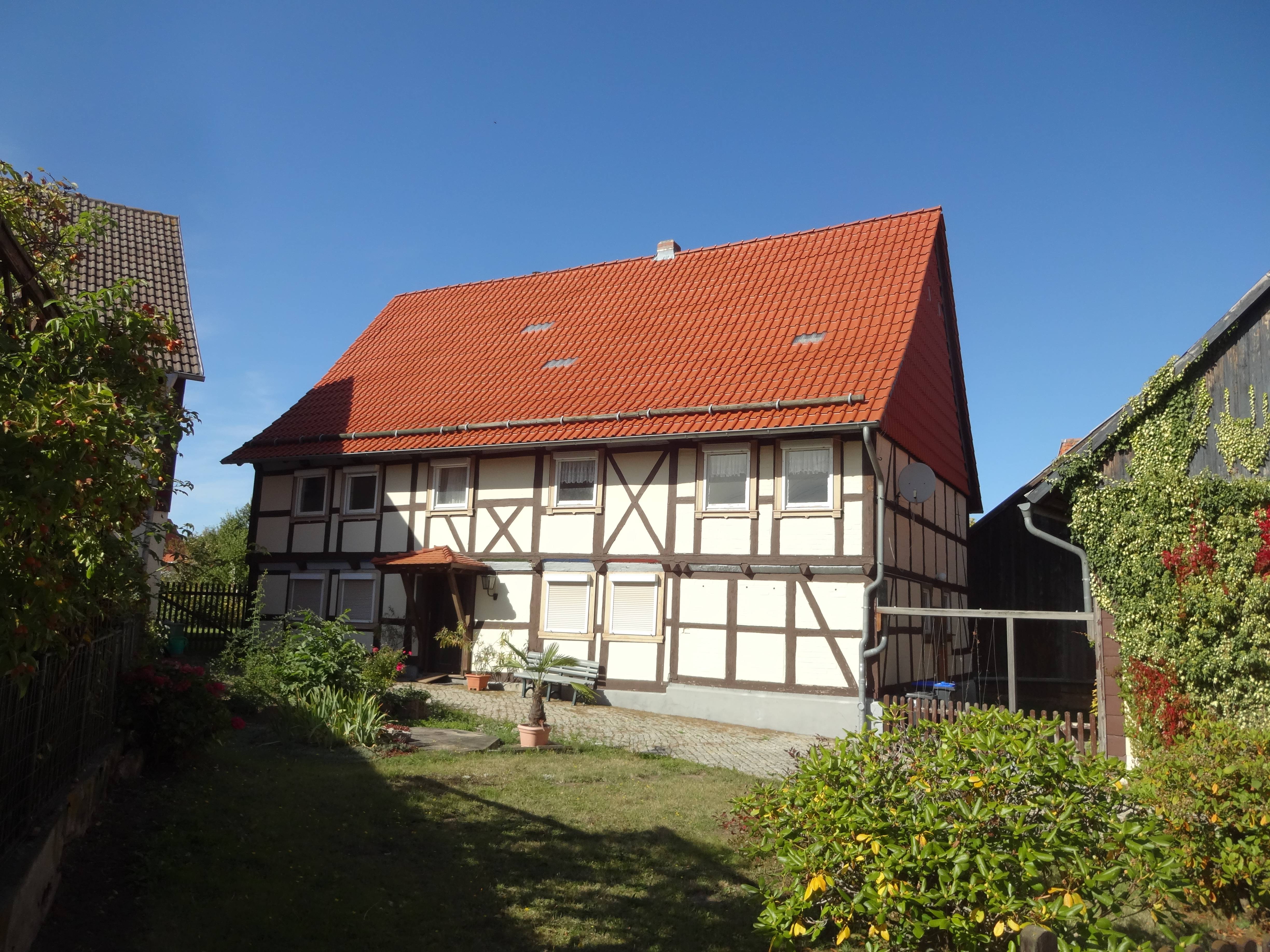 denkmalgeschütztes Wohnhaus in der Backhausgasse 1 in Drübeck